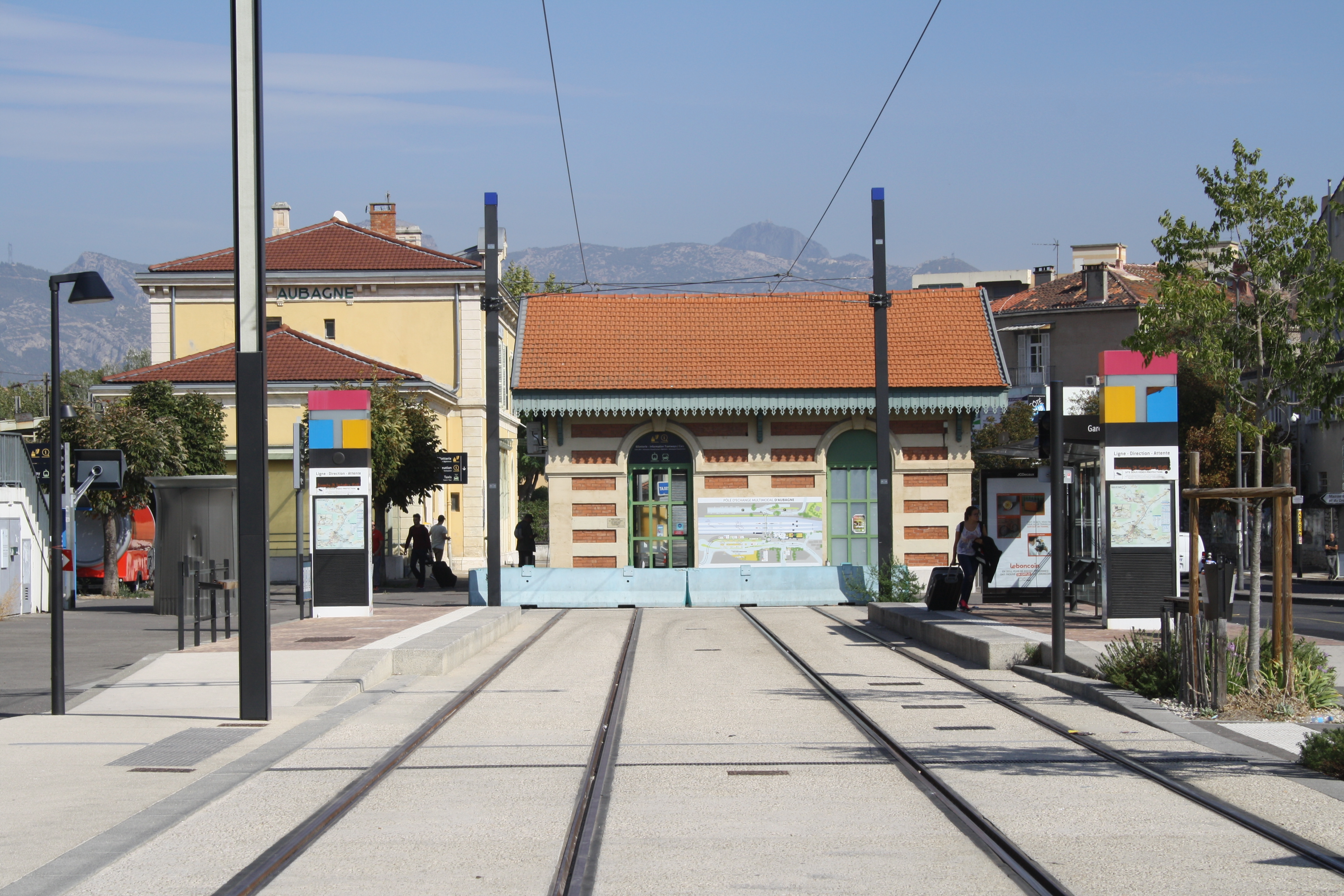 Terminus Gare d'Aubagne du tramway